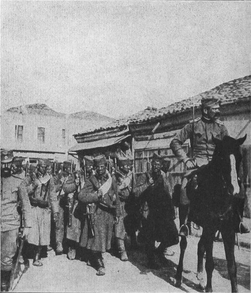 Des troupes, Serbes, se rendant à la bataille de la Drina.